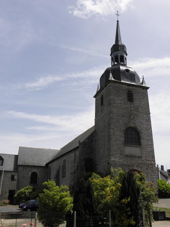 Église Saint-Martin de Chanteloup (35)